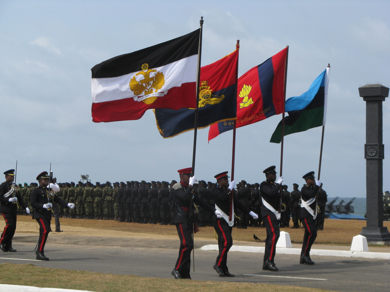 Sri Lanka Army